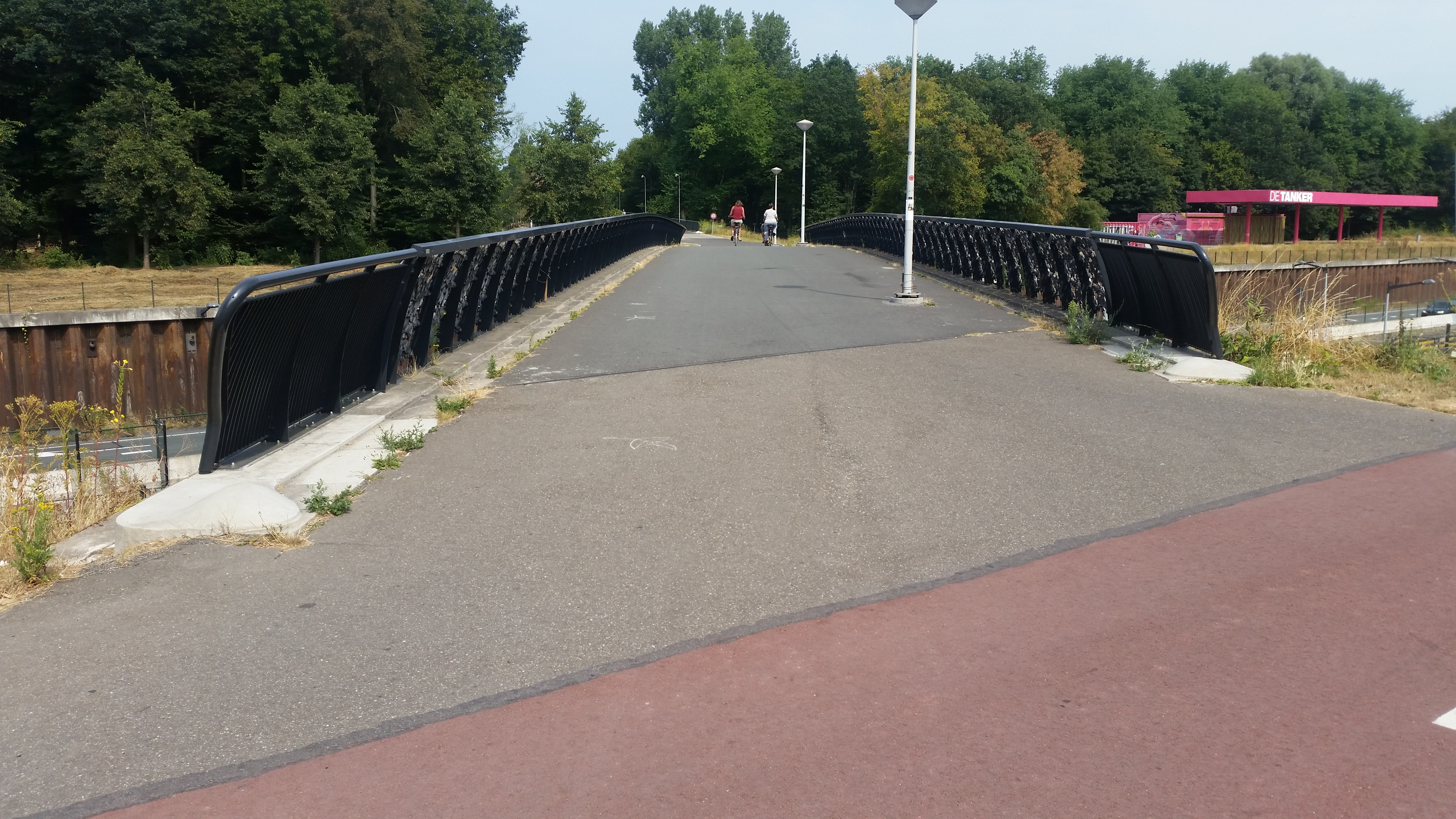 Brug 999, Klimopbrug, overzicht naar het westen